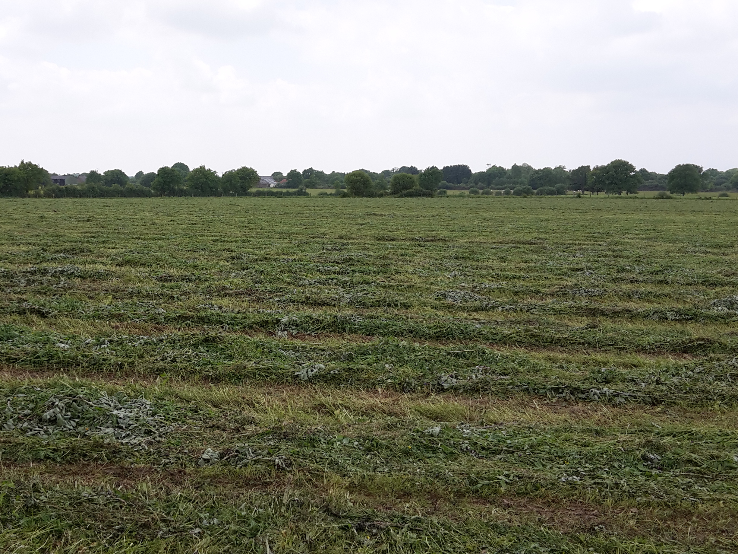 Paysage autour du Bois du Pin, Le Pin, Loire-Atlantique, France.